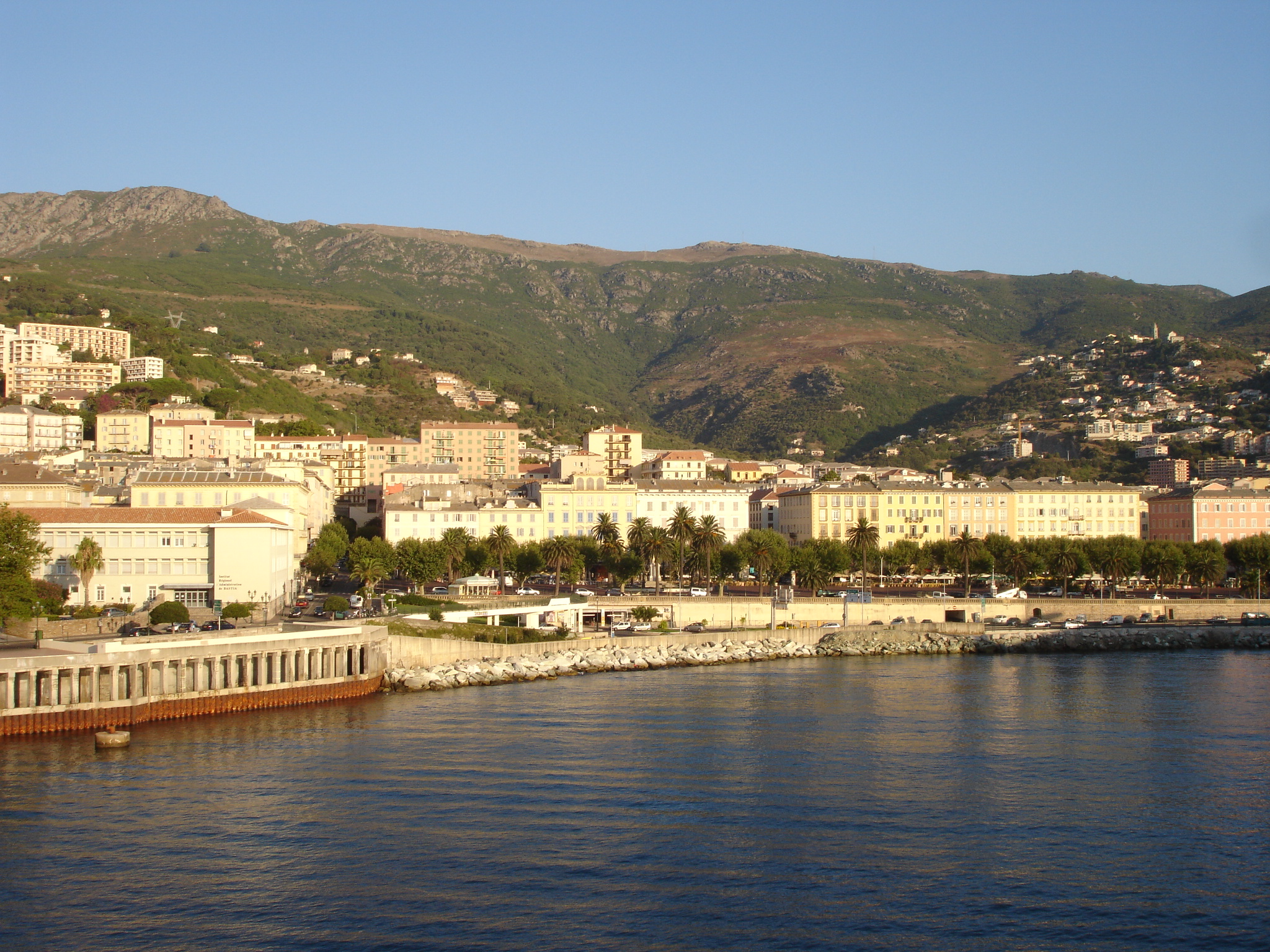 France, Haute-Corse (2B), Bastia, port commercial